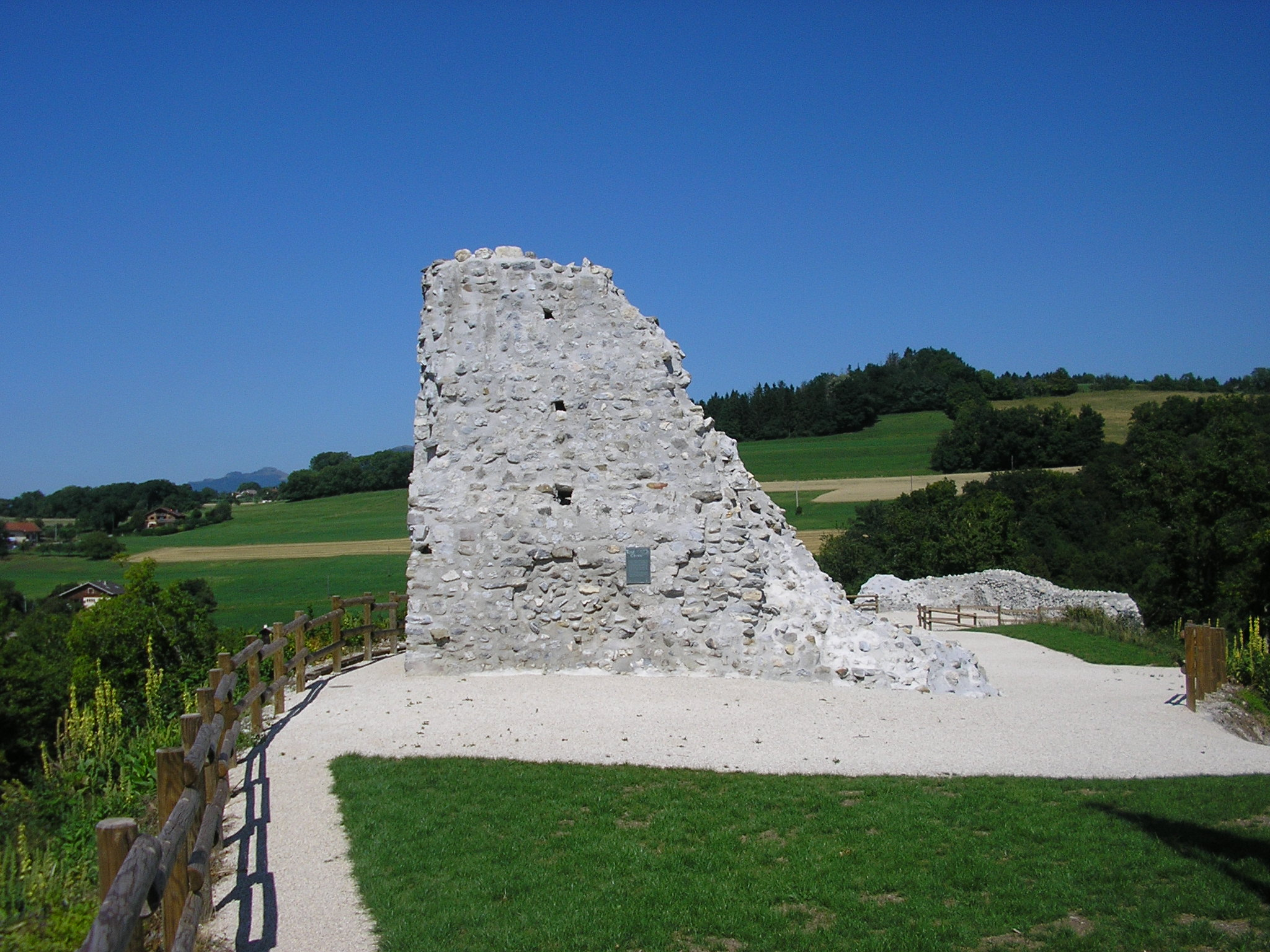 Les ruines du château de Faucigny en Haute-Savoie.